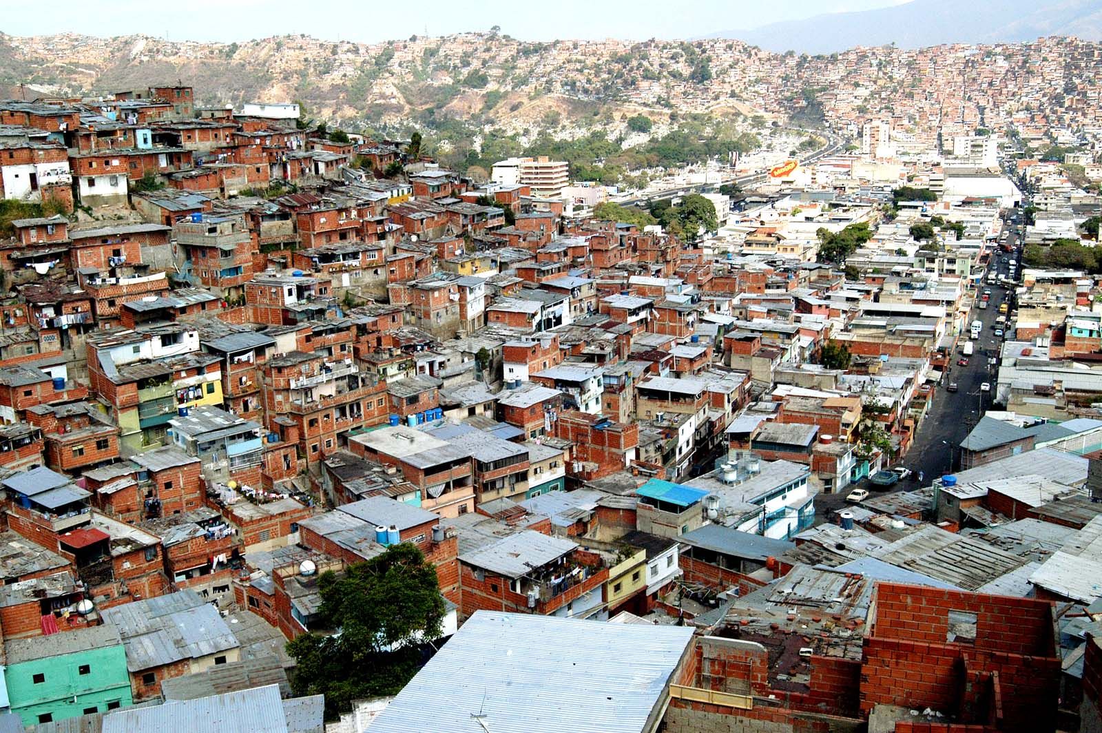 Vista de los Cerros de Caracas. Lugar: Municipio Libertador, Distrito Capital, Caracas, Venezuela.